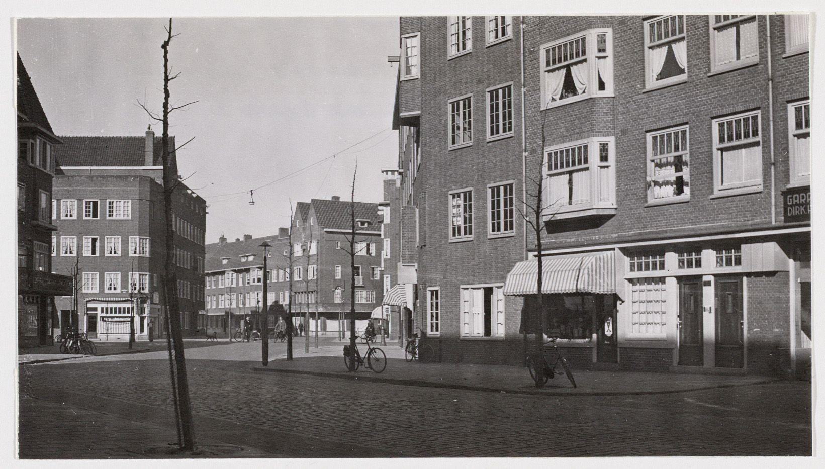 Beschrijving Rietwijkerstraat Op de voorgrond rechts nummers 22-24. Op de achtergrond links: Woubruggestraat, gezien in westelijke richting Documenttype foto Vervaardiger Eck, J. van (Jacobus, 1873-1946) Collectie Collectie J. van Eck: foto's Datering 20 maart 1938 Geografische naam Woubruggestraat Rietwijkerstraat Inventarissen Afbeeldingsbestand A01634001004 Generated with Dememorixer